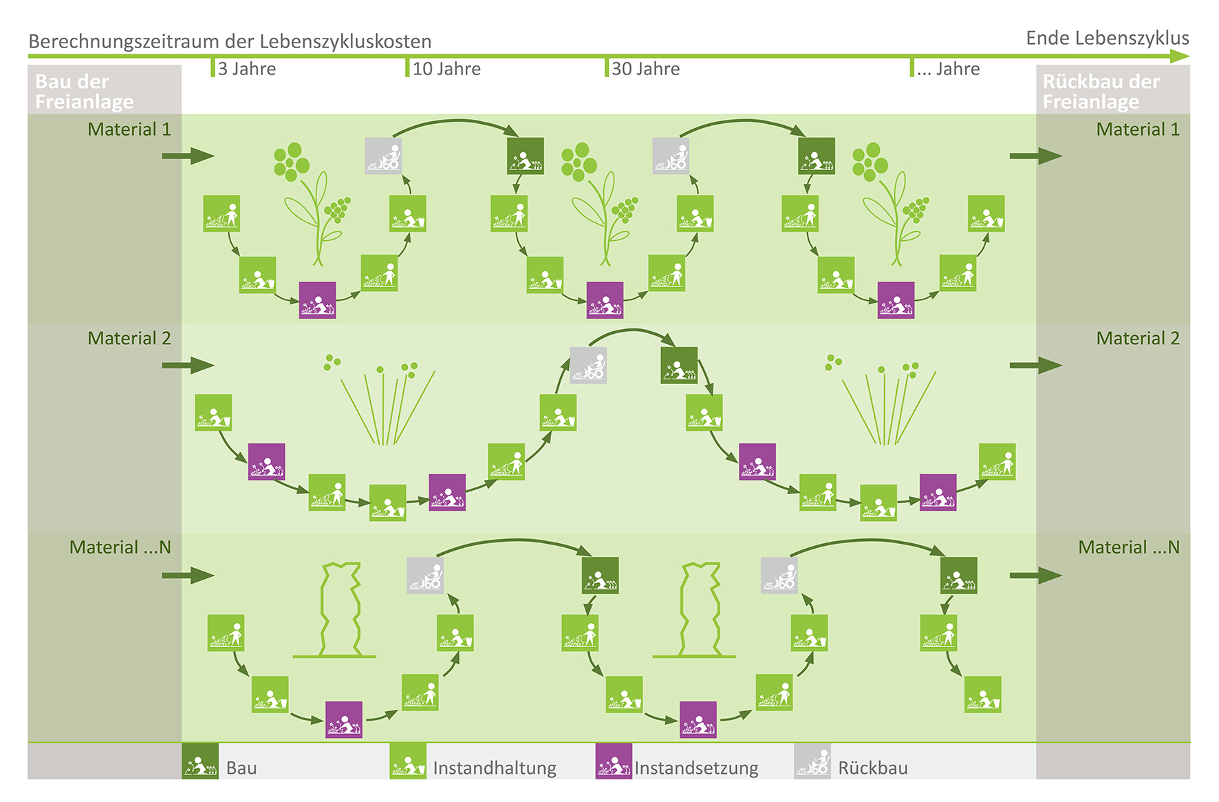 Zur Berechnung der Lebenszykluskosten einer ganzen Freianlagen müssen die parallellaufenden Lebenszyklen der einzelnen Flächeninhalte der Anlage berechnet werden.